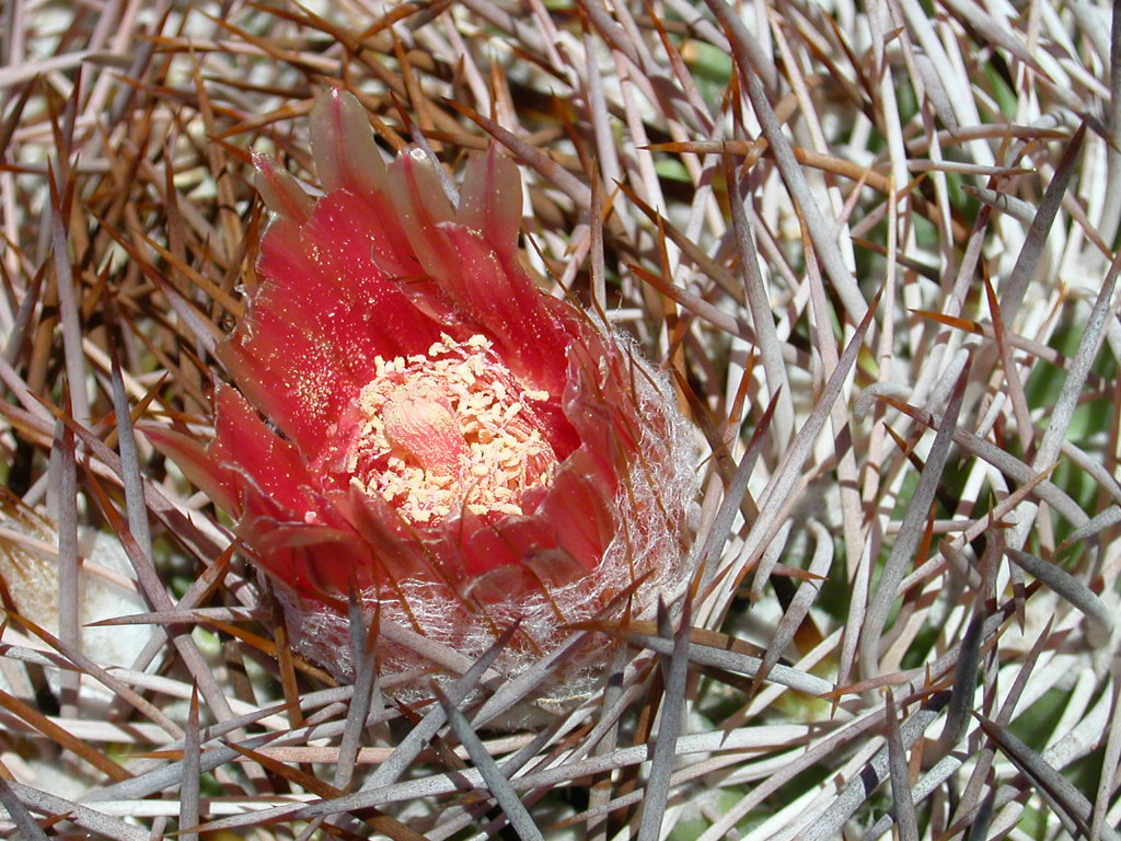 Eriosyce aurata "forma algarrobensis" Cerca de la mina Algarrobo, oeste de Domeyko (norte de La Serena). Estas poblacion de cactus es de la cordillera de la costa; no de la cordillera de los Andes, son de menor tamaño, pero espinas igual de rigidas y fuertes.